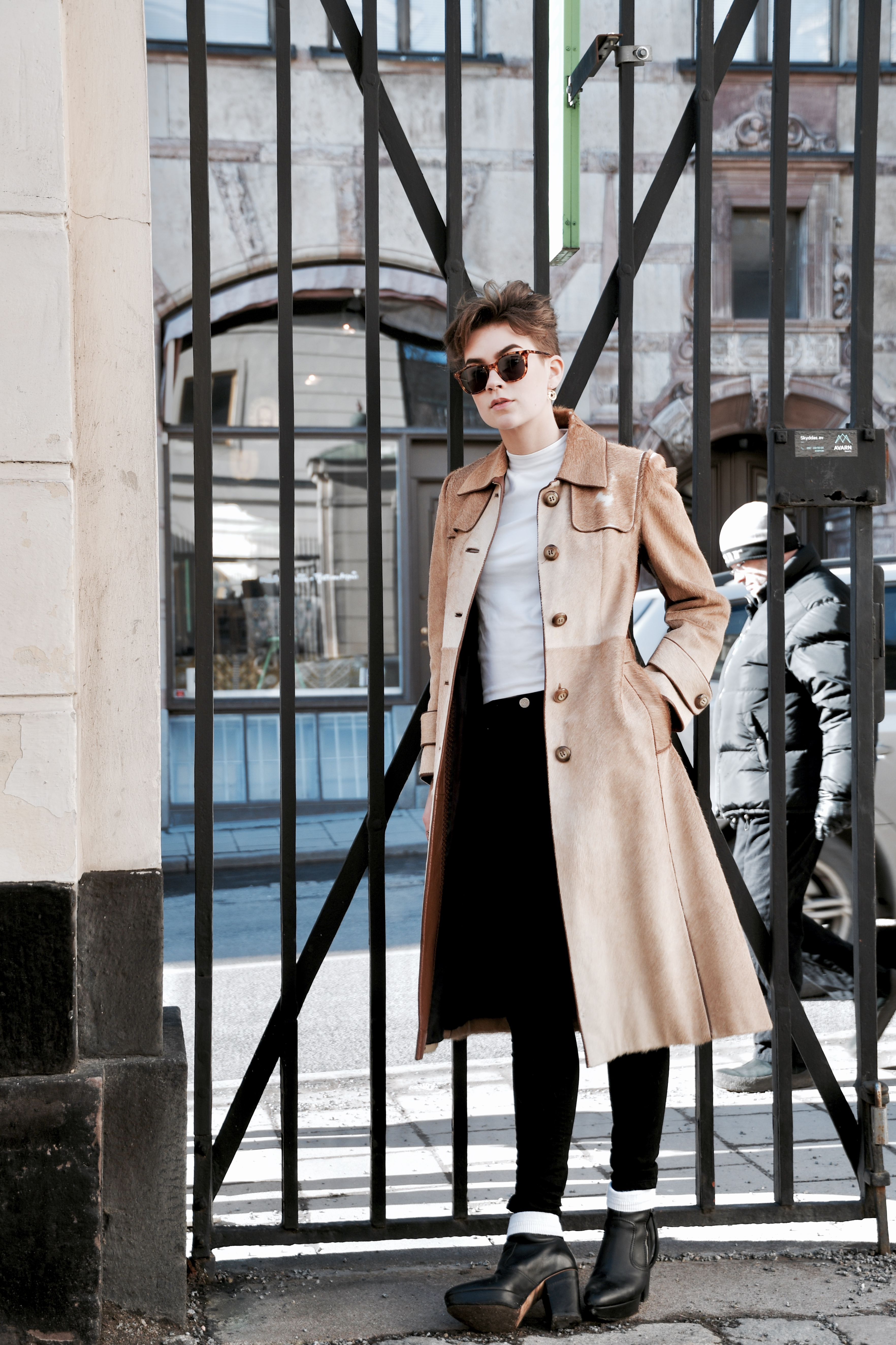 Maj Lundgren, modell "SON&SON"